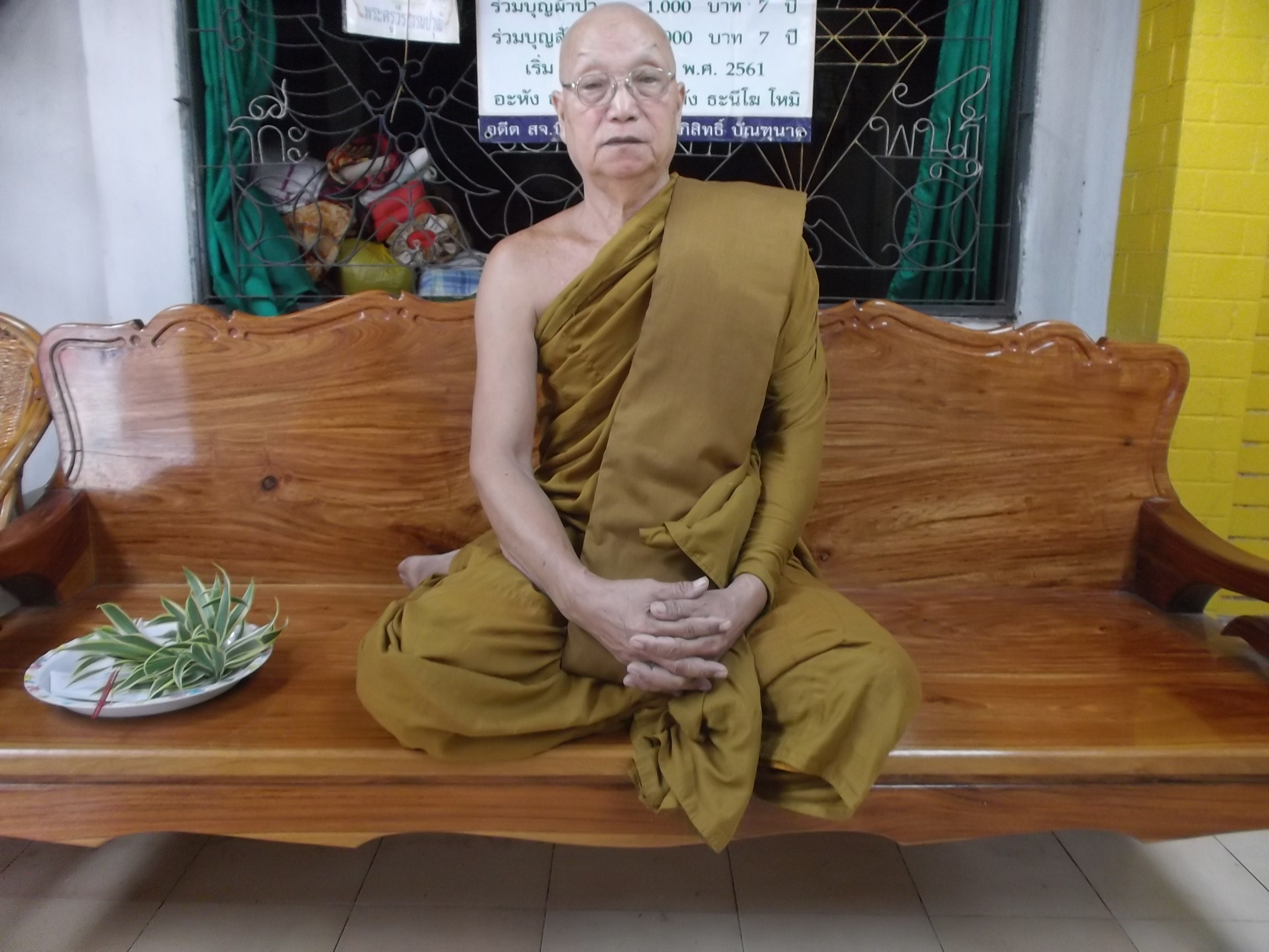 เจ้าอาวาสองค์ปัจจุบัน